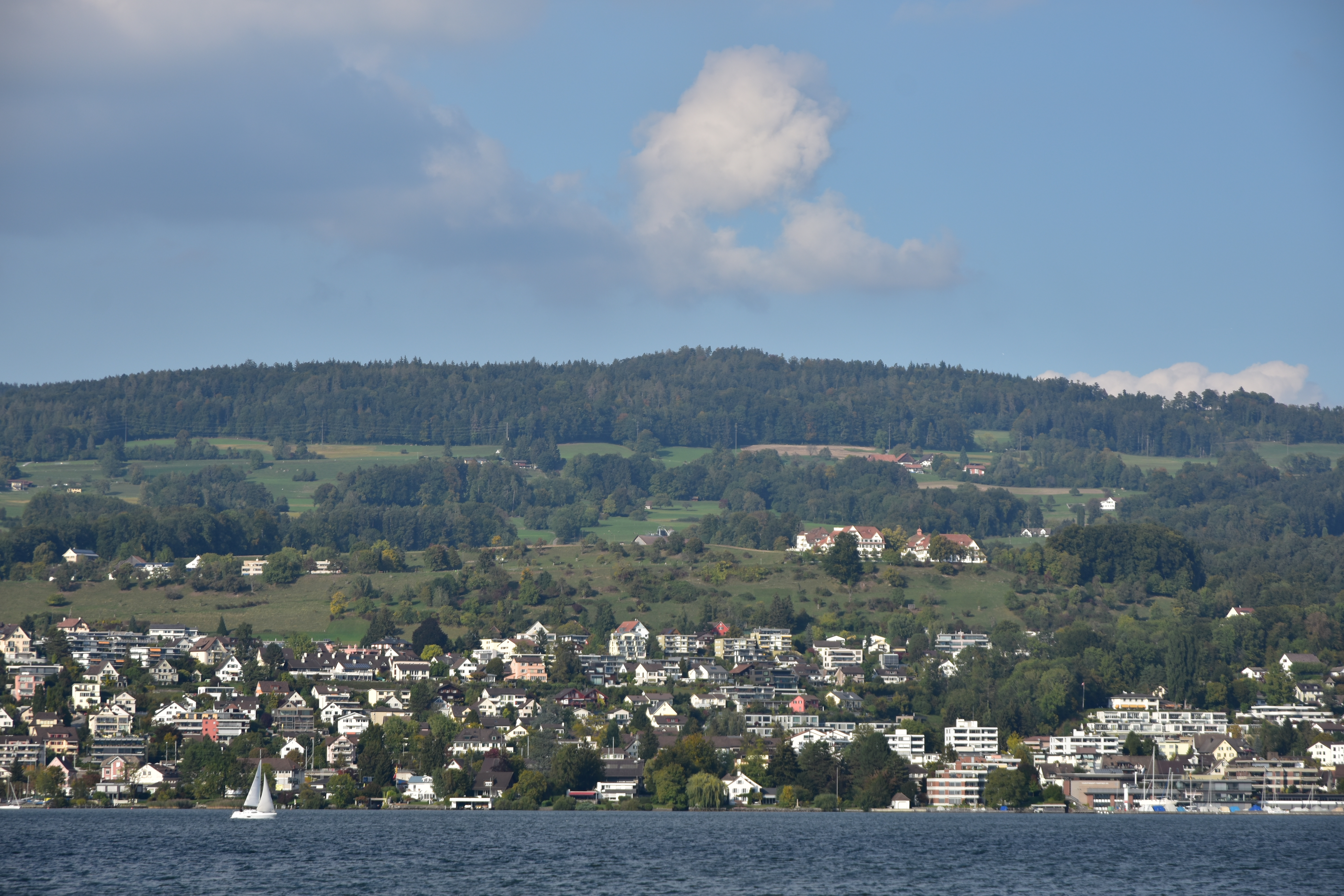 Meilen and Pfannenstiel, as seen from Au peninsula on Zürichsee in Switzerland